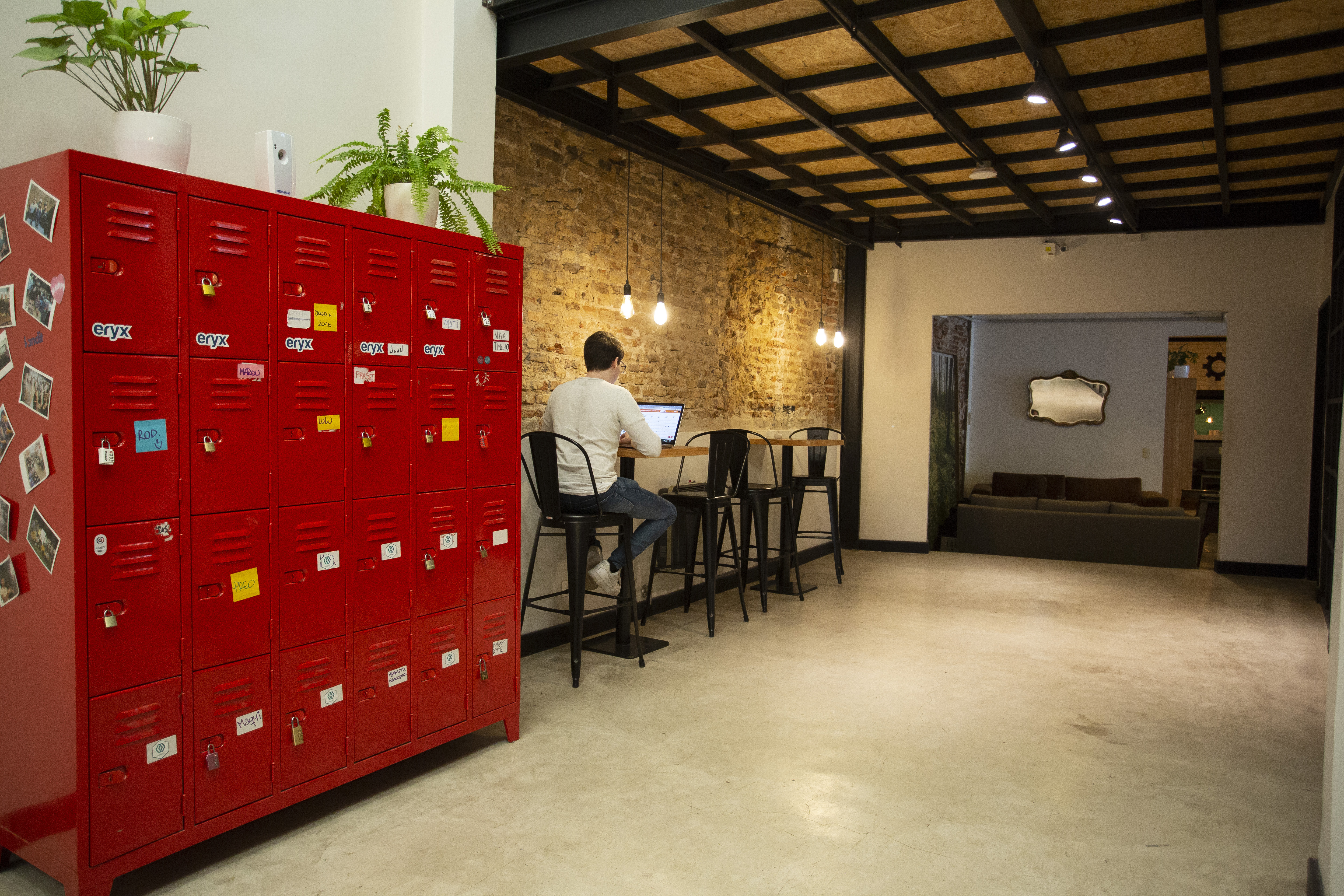 Espacio de trabajo compartido en Buenos Aires (Argentina). La Maquinita Co. Palermo Soho.